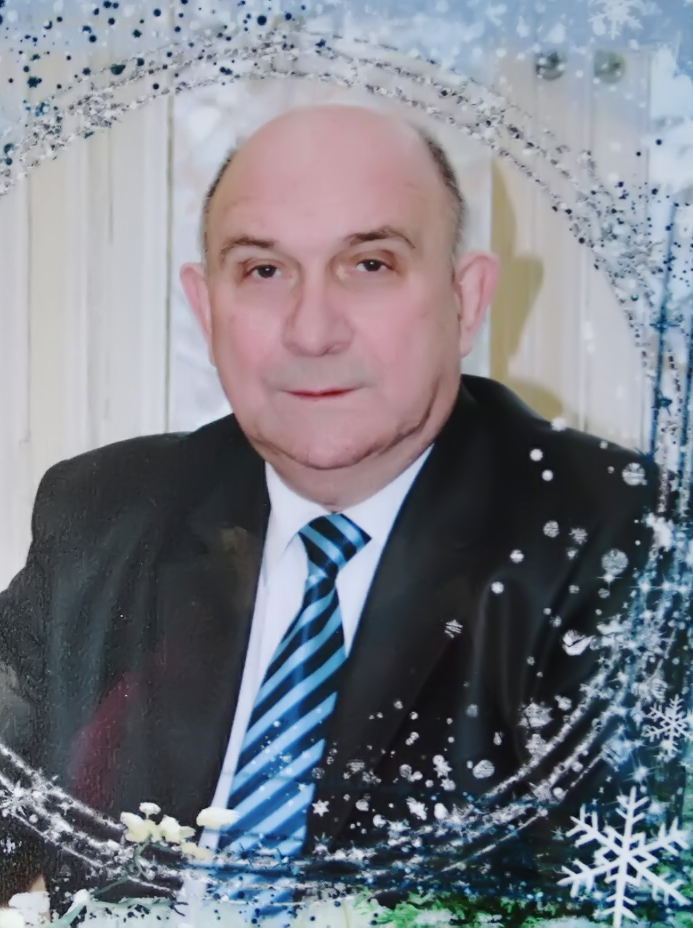 Професор Олег Ярославович Пилипчук